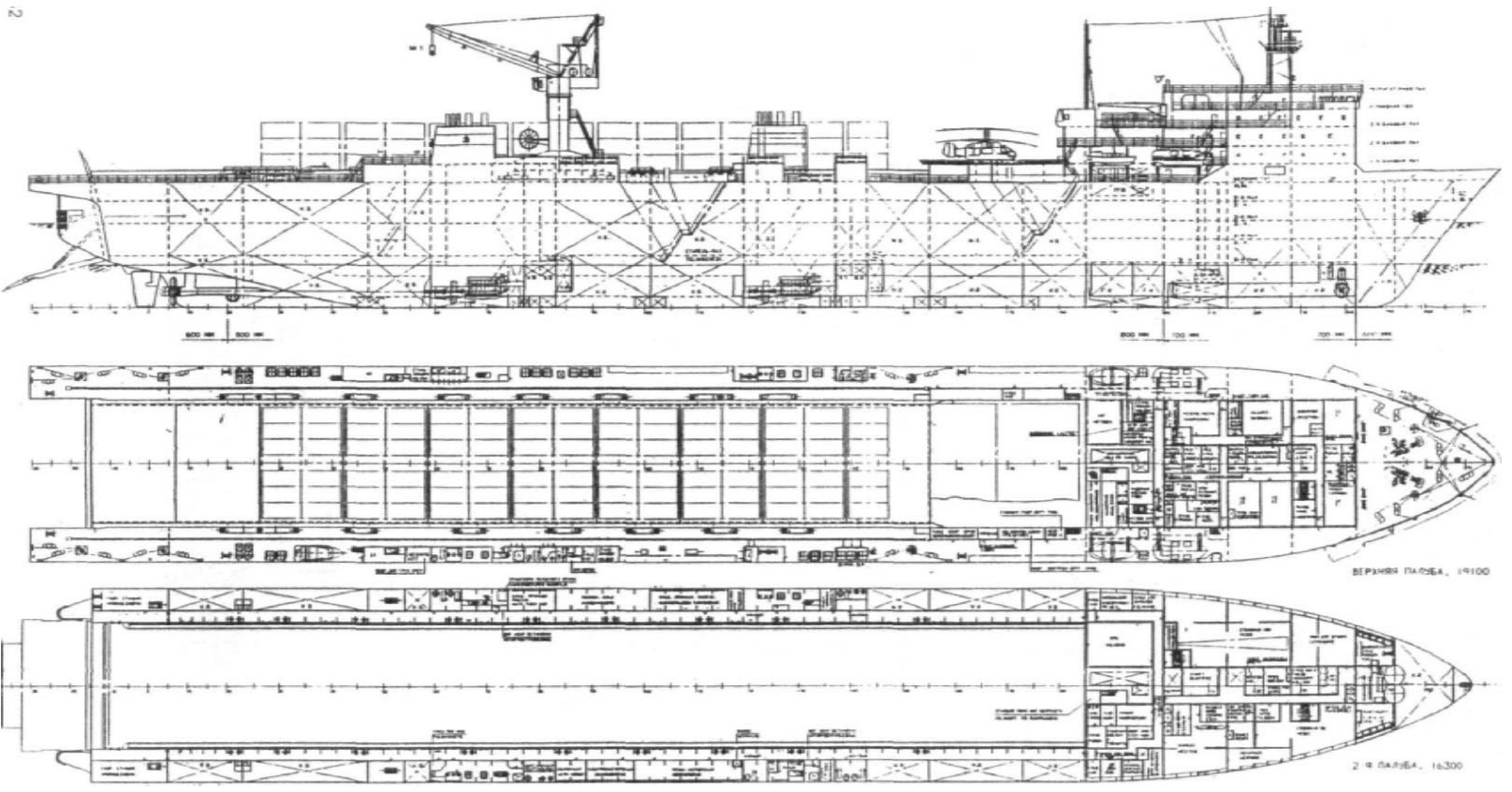 План-схема транспортного судна "Анадырь"